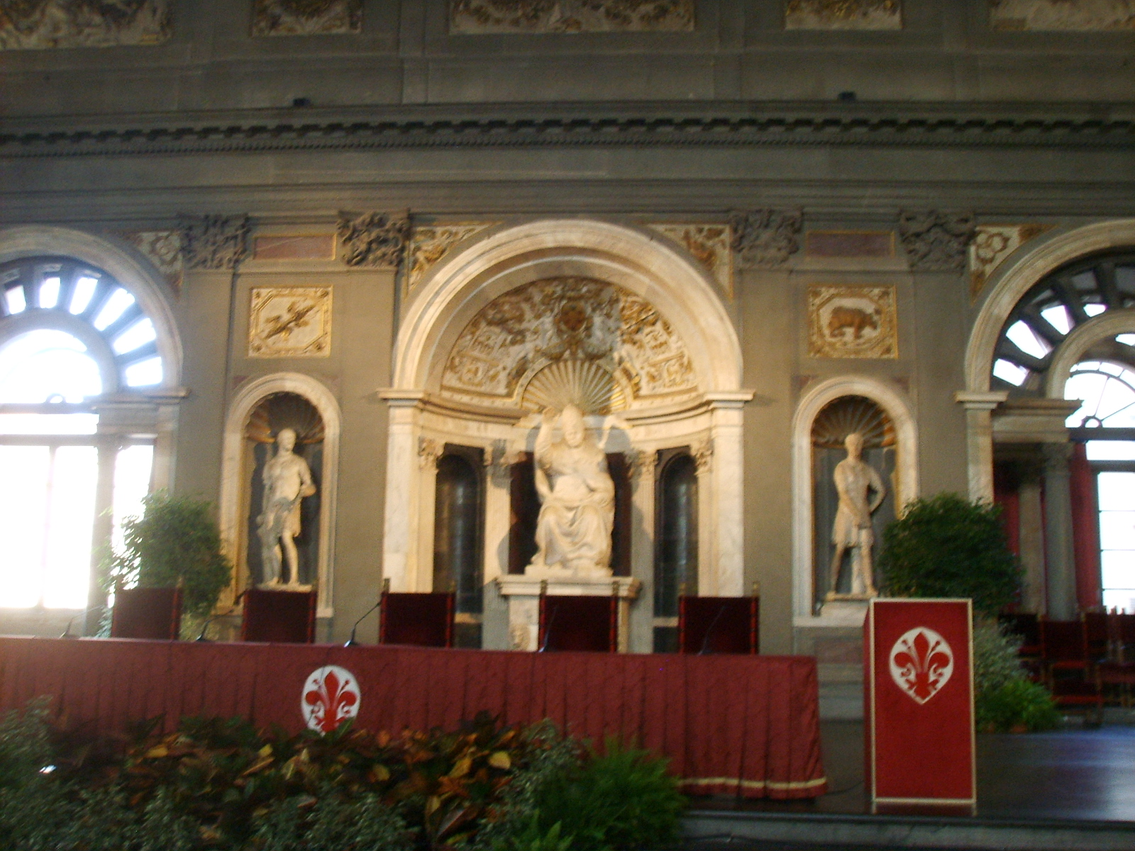 Palazzo vecchio, salone dei 500 udienza